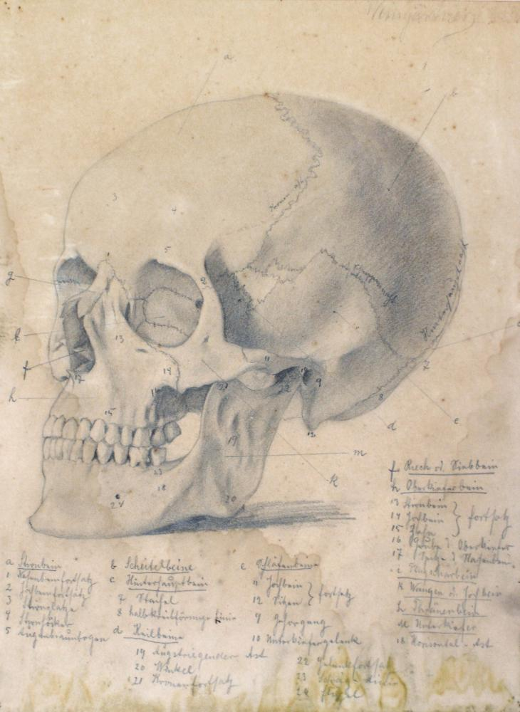 PEDRO WEINGARTNER, estudo, sd, grafite s/ papel 32 x 24 cm. Acervo da Pinacoteca Barão de Santo Ângelo, Instituto de Artes da UFRGS, Porto Alegre, Brasil.